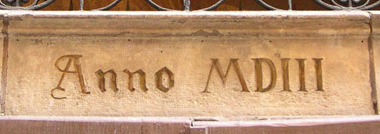 Llinda de la porta d'entrada de la capella de Sant Cristòfol al carrer de Regomir de la Ciutat Vella de Barcelona. Fotgrafia feta per mi el 20 de setembre de 2006.